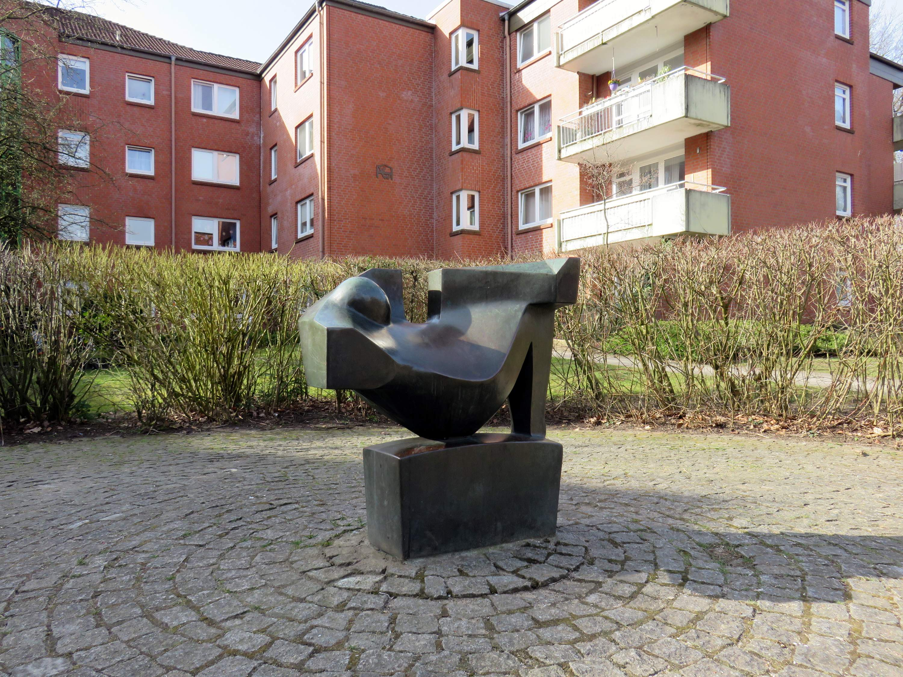 Bronze-Skulptur Der Faulenzer von Karl Heinz Engelin von 1984 vor Wohnanlage Buchenring 5 in Hamburg-Volksdorf.